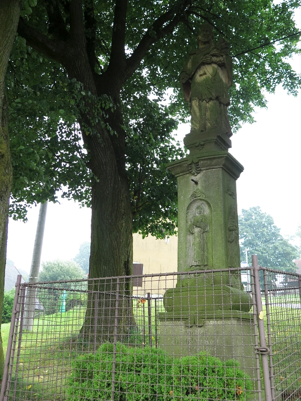 Sloup se sochou svatého Jana Nepomuckého, na návsi, Slavný.